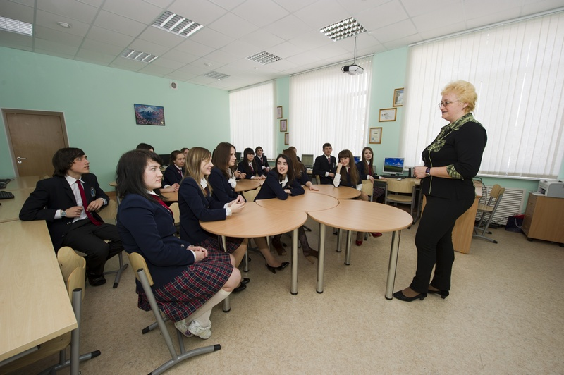 ученики профильных классов